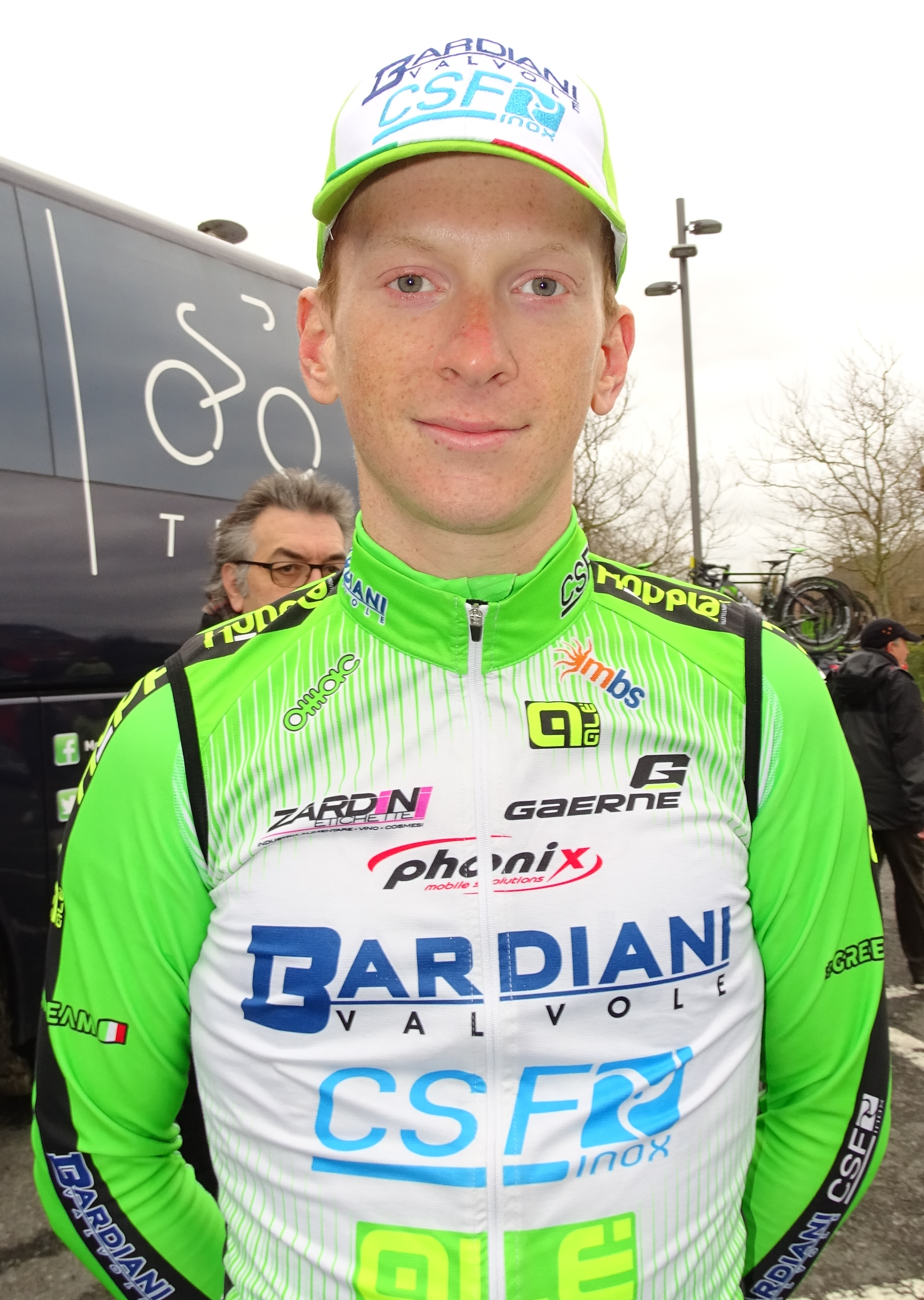 Reportage réalisé le mardi 31 mars à l'occasion de du départ de la première étape des Trois jours de La Panne 2015 à La Panne, Belgique.